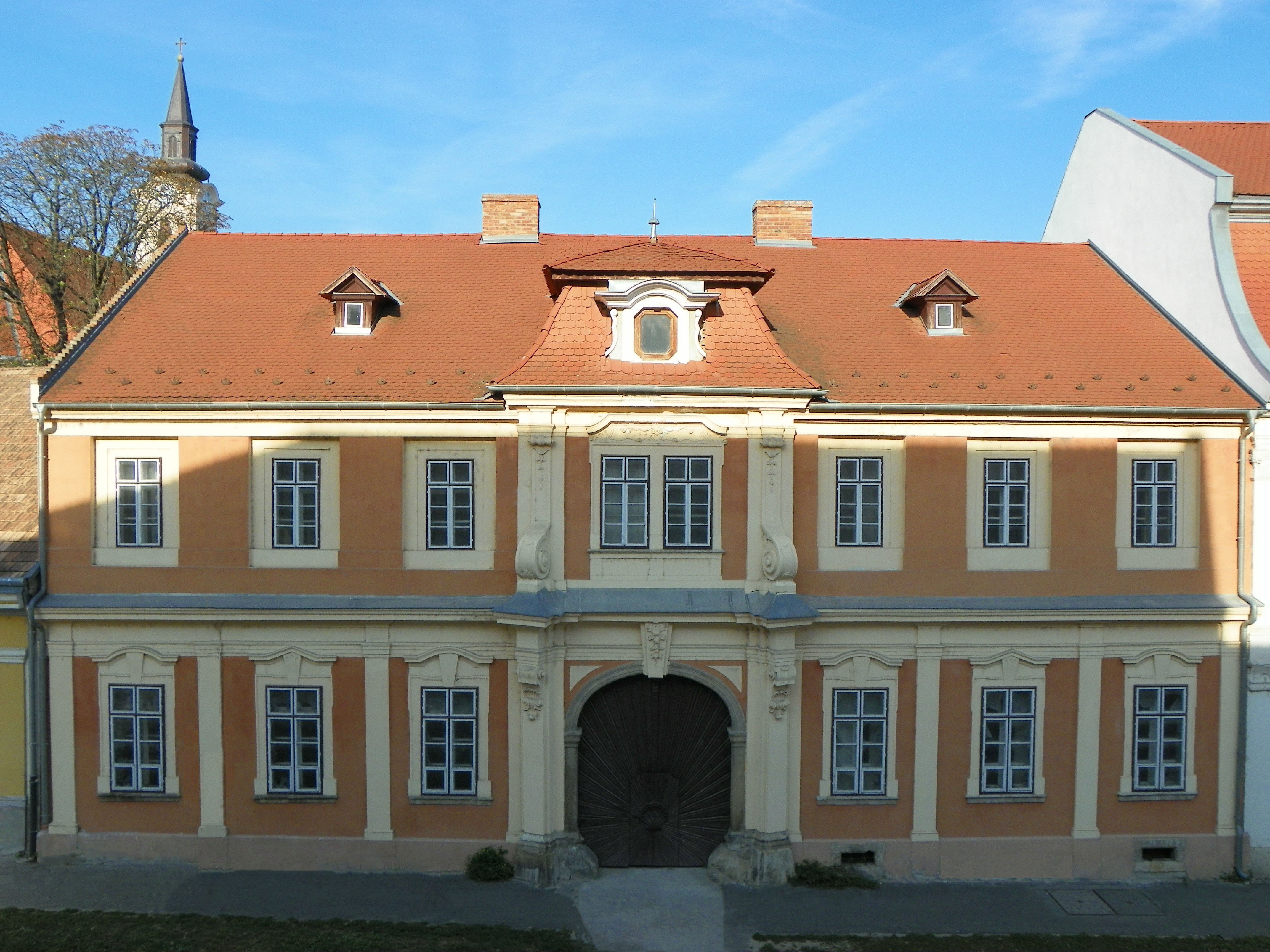 Meszéna-ház